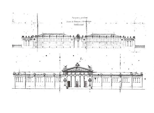 Proyectos para el Museo Martorell de Geología: arriba, de Josep Fontserè i Mestre; abajo, de Antoni Rovira i Trias.